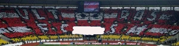 "Ultras FCSM" - перформанс на Суперкубке России. 2007 год